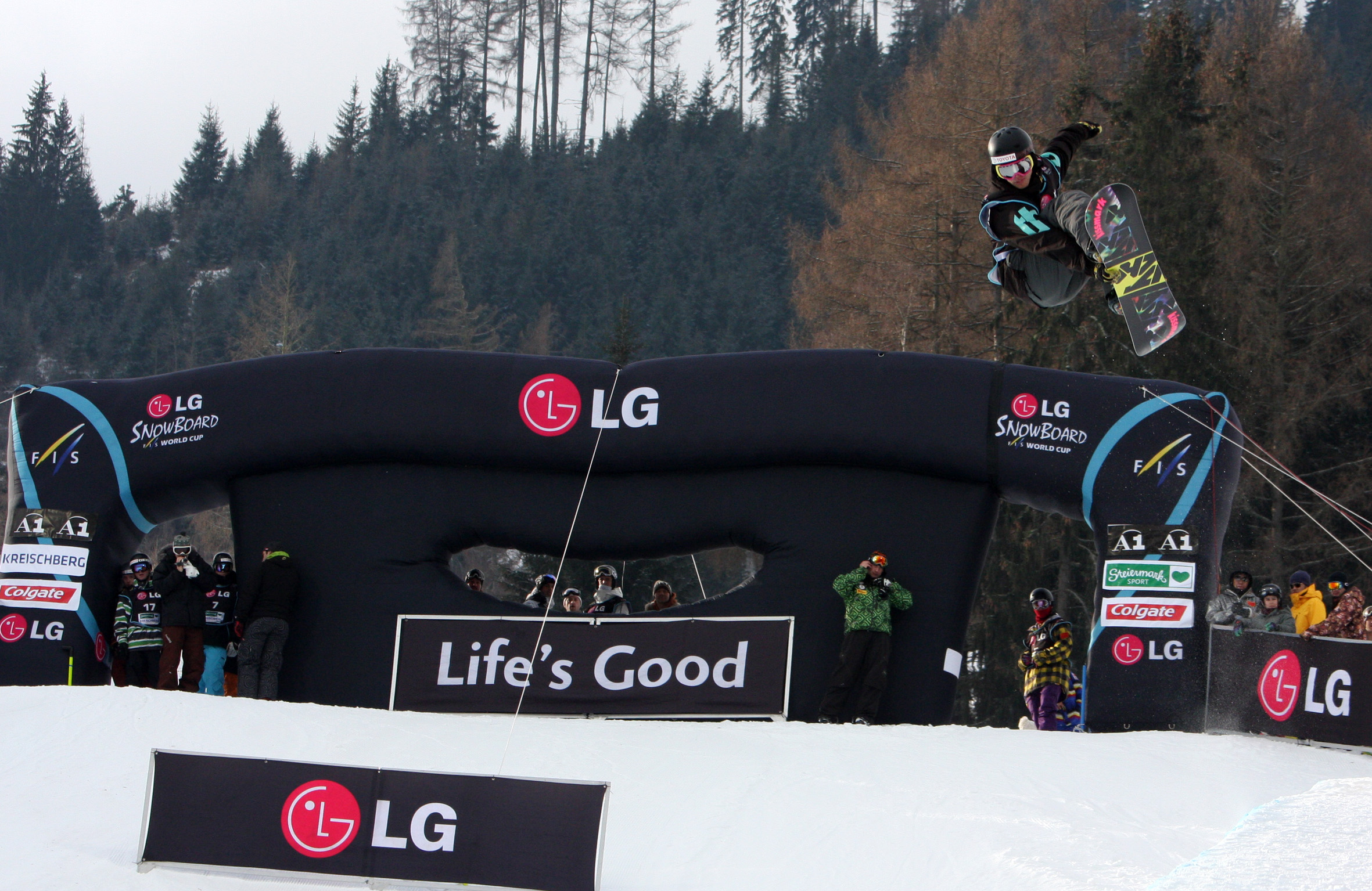 Kreischberg_HP_Markus_Malin_FIN